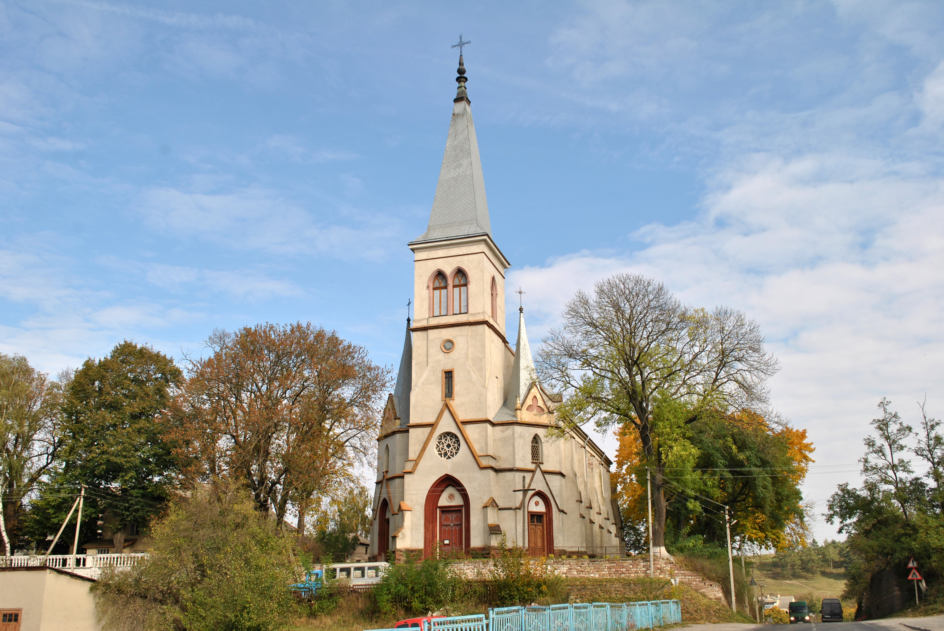 Костел Святого Антонія (1893–1902, мур.) у селі Струсів Теребовлянського району Тернопільської області.